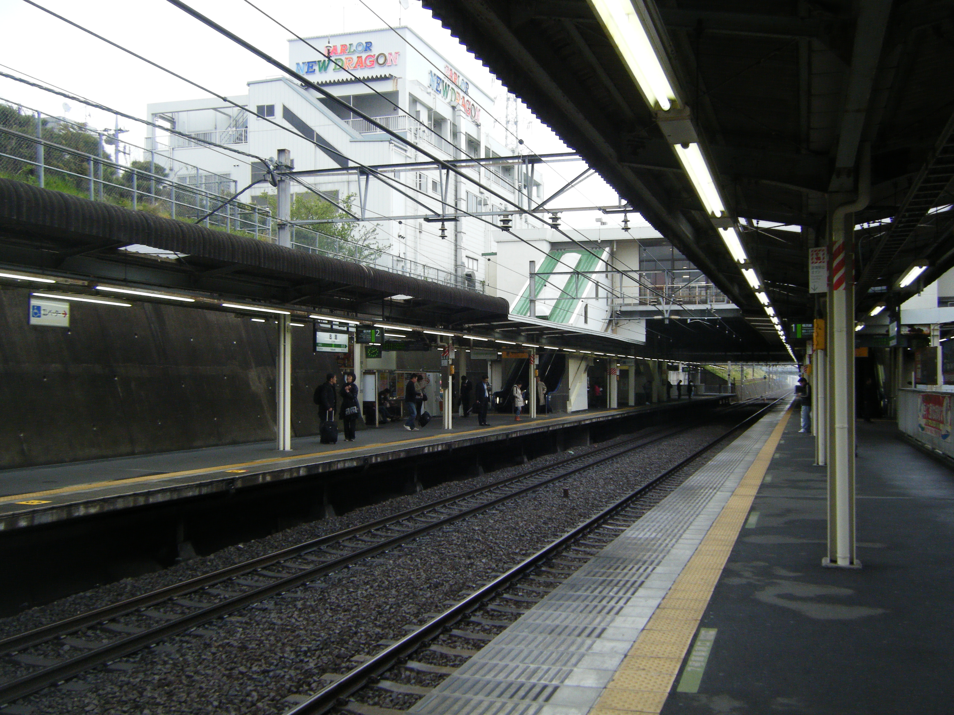 JR東日本、横浜線、古淵駅構内。相模原方から町田方向に向けて撮影。